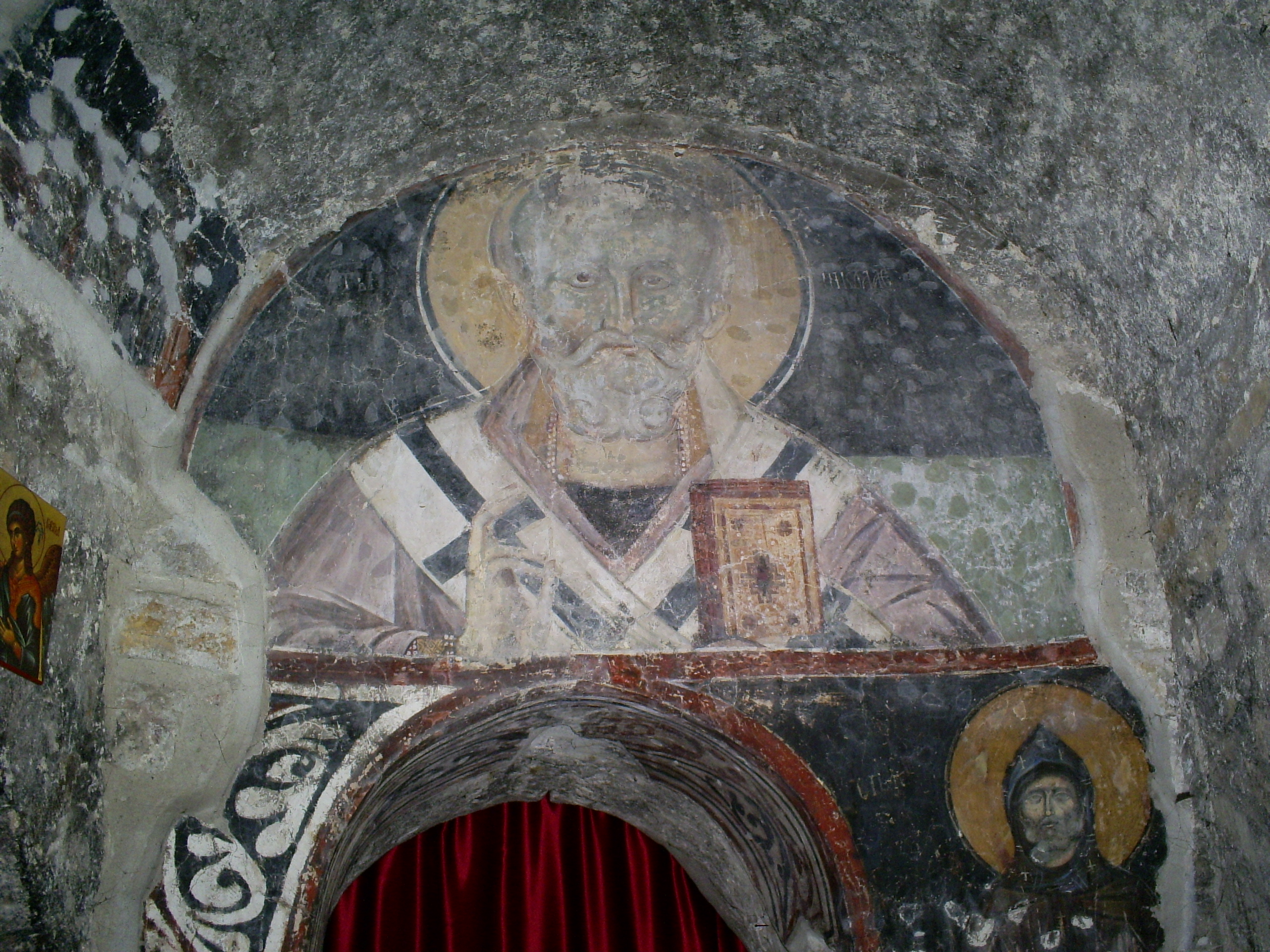 Petrova crkva- freska svetog Nikole